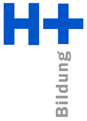 Firmenlogo